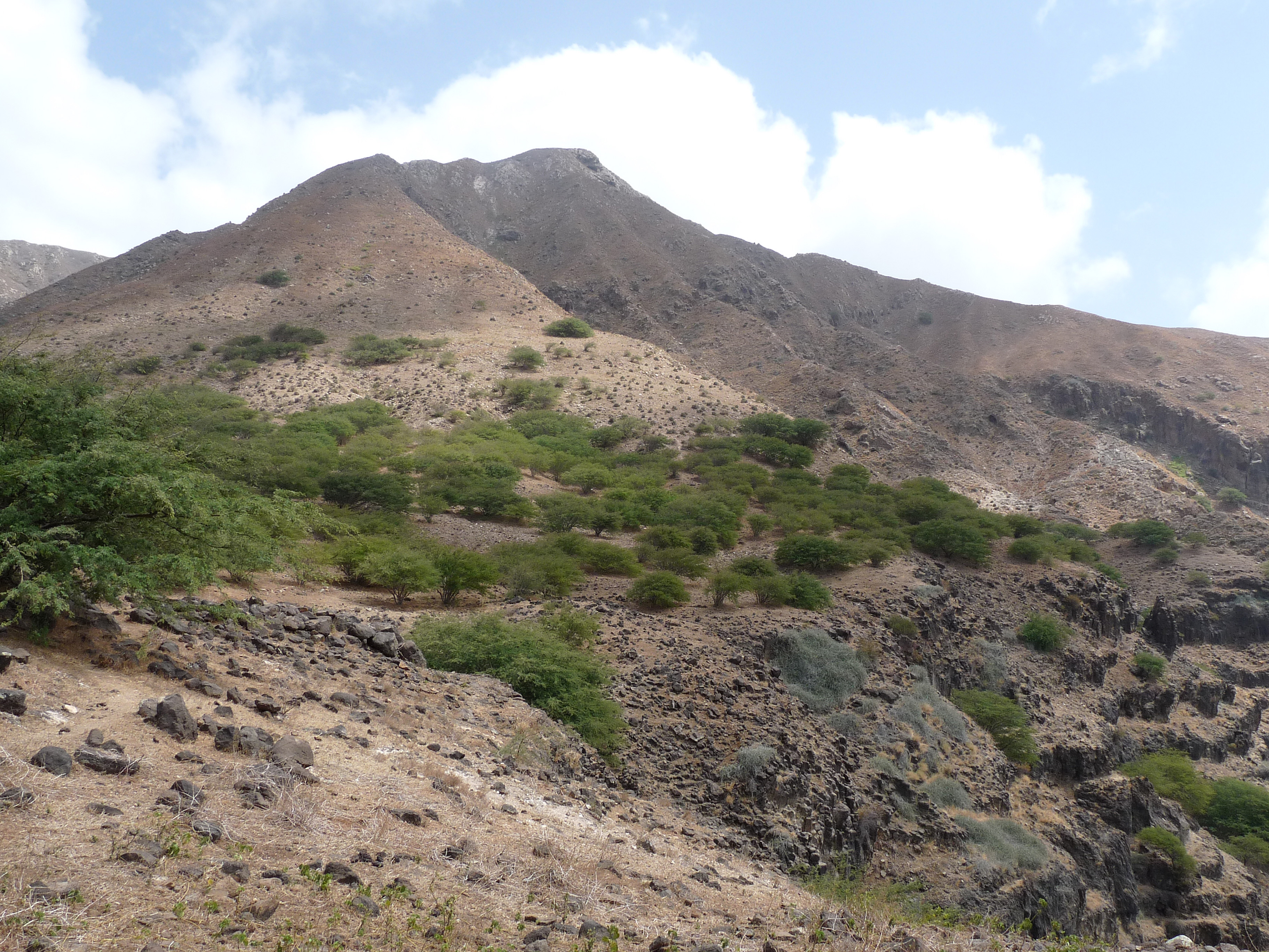 Monte Graciosa, au nord de l'île de Santiago (Cap-Vert)